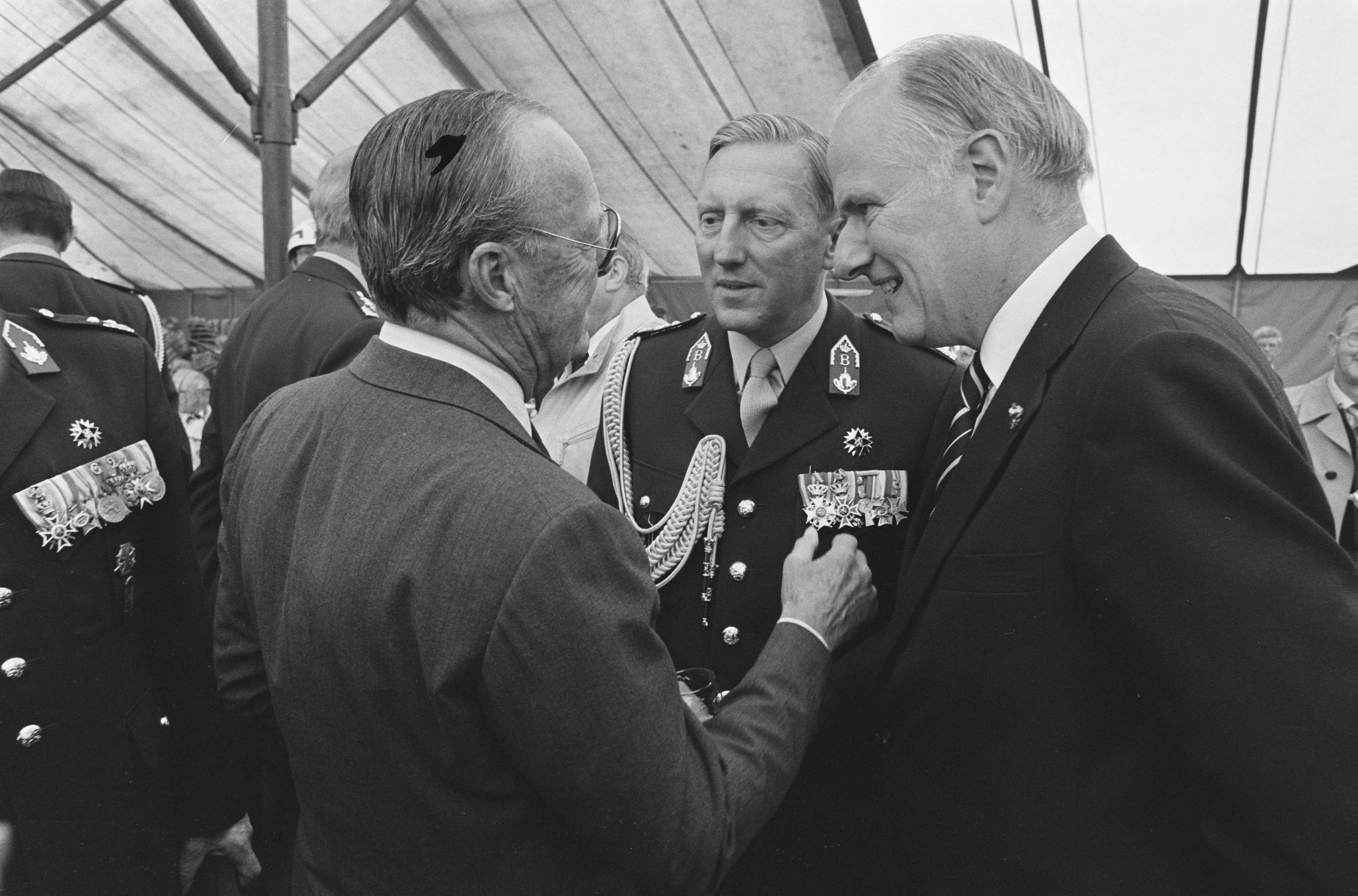 Collectie / Archief : Fotocollectie Anefo Reportage / Serie : [ onbekend ] Beschrijving : Prins Bernhard bij reunie tgv 40 jarig bestaan eerste Divisie " 7 december "; vlnr: prins Bernhard , generaal Huyser (chef Def.staf), minister van Eekelen van Datum : 30 augustus 1986 Trefwoorden : Reunies, generaals, jubilea, ministers, prinsen Persoonsnaam : Bernhard, prins, Eekelen, Wim van, Huyser Fotograaf : Bogaerts, Rob / Anefo Auteursrechthebbende : Nationaal Archief Materiaalsoort : Negatief (zwart/wit) Nummer archiefinventaris : bekijk toegang 2.24.01.05 Bestanddeelnummer : 933-7439